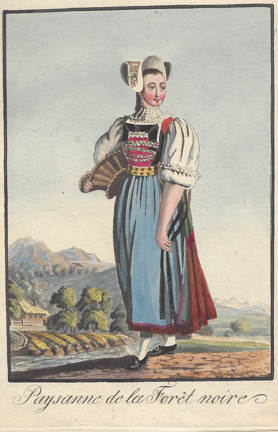 Tracht der ledigen Frauen der Grafschaft Hauenstein im Südschwarzwald mit Schühut nach einem Porträt von Markus Dinkel um 1810